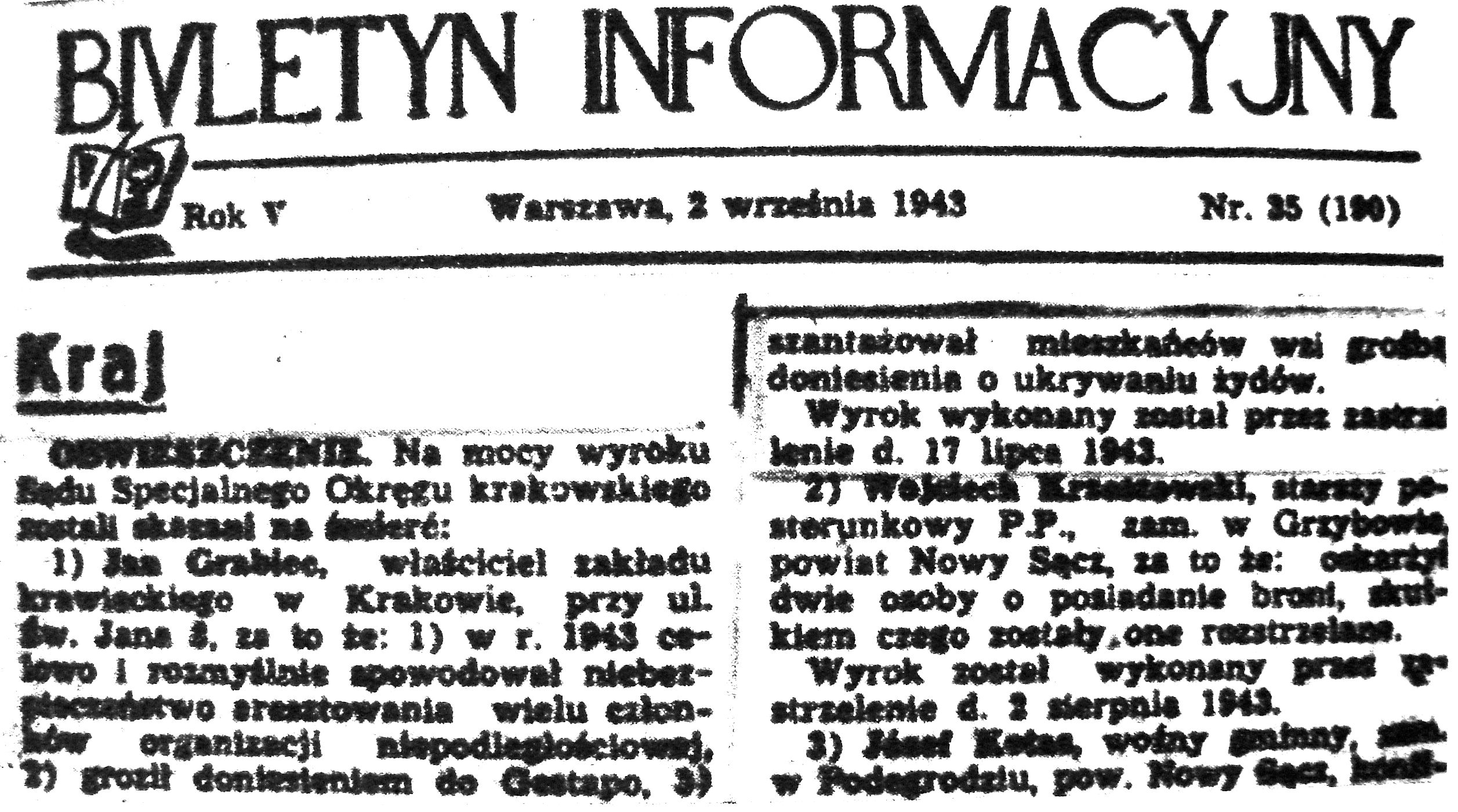 Biuletyn Informacyjny 2 września 1943.